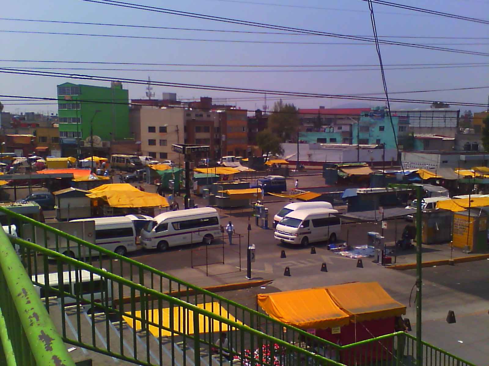 CETRAM La Raza